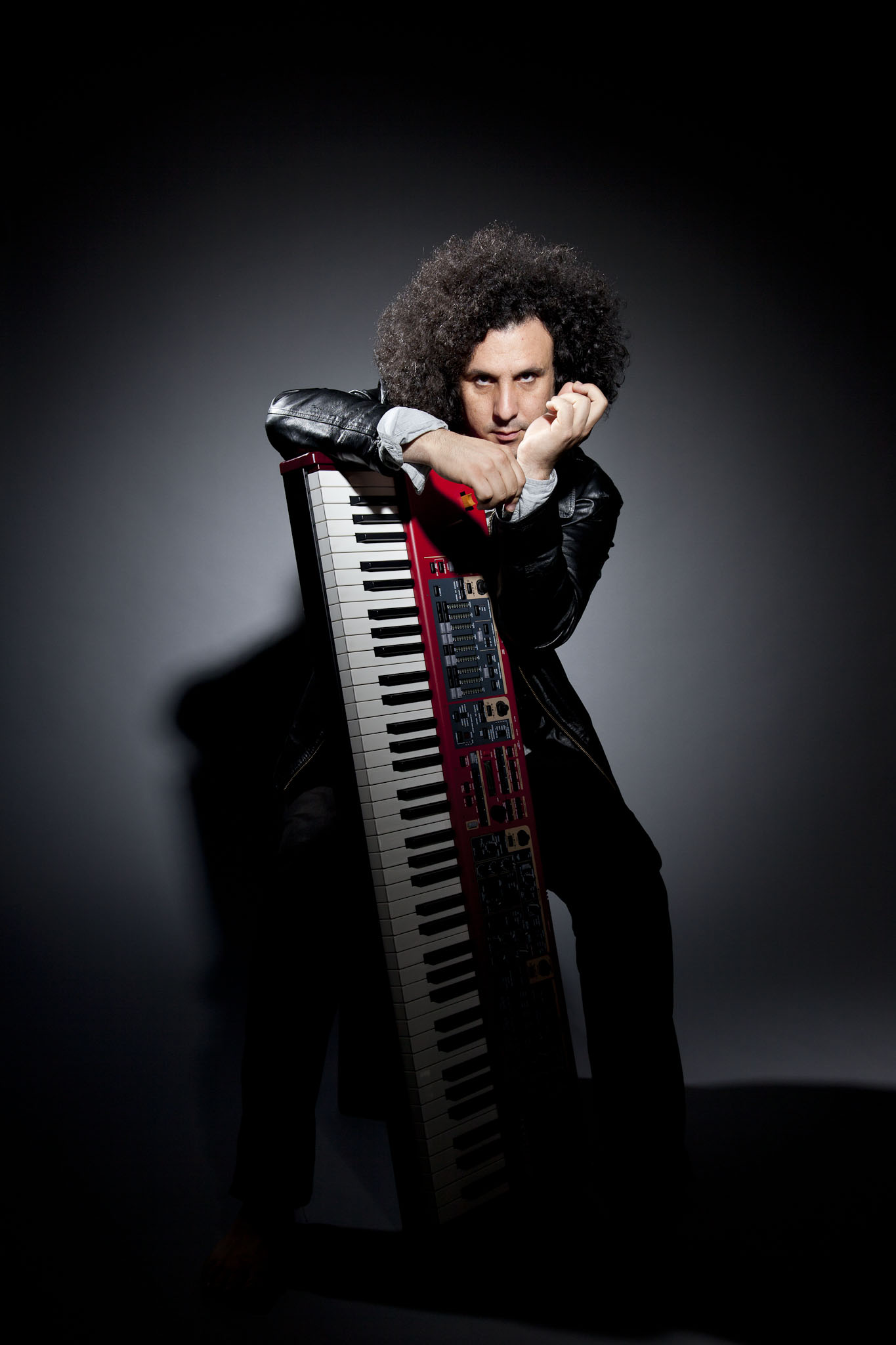 Sebastían Volco - Compositor y Pianista